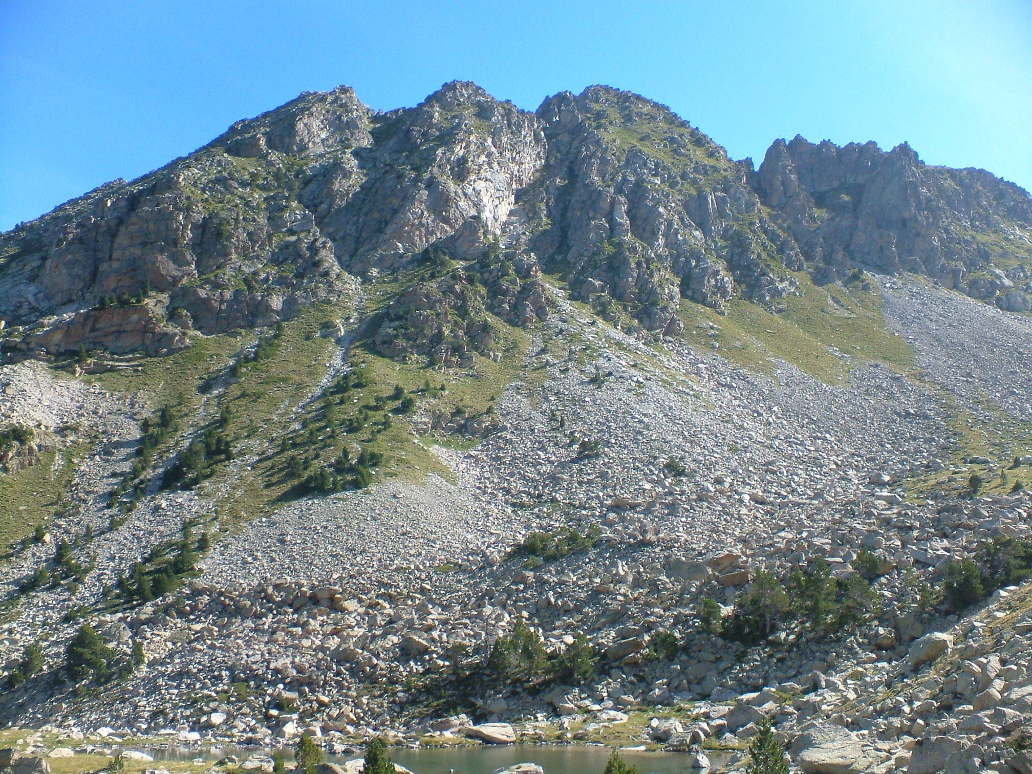 Tuc de la Montanyeta des de la Vall de Dellui; la Vall de Boí, Alta Ribagorça, Catalunya